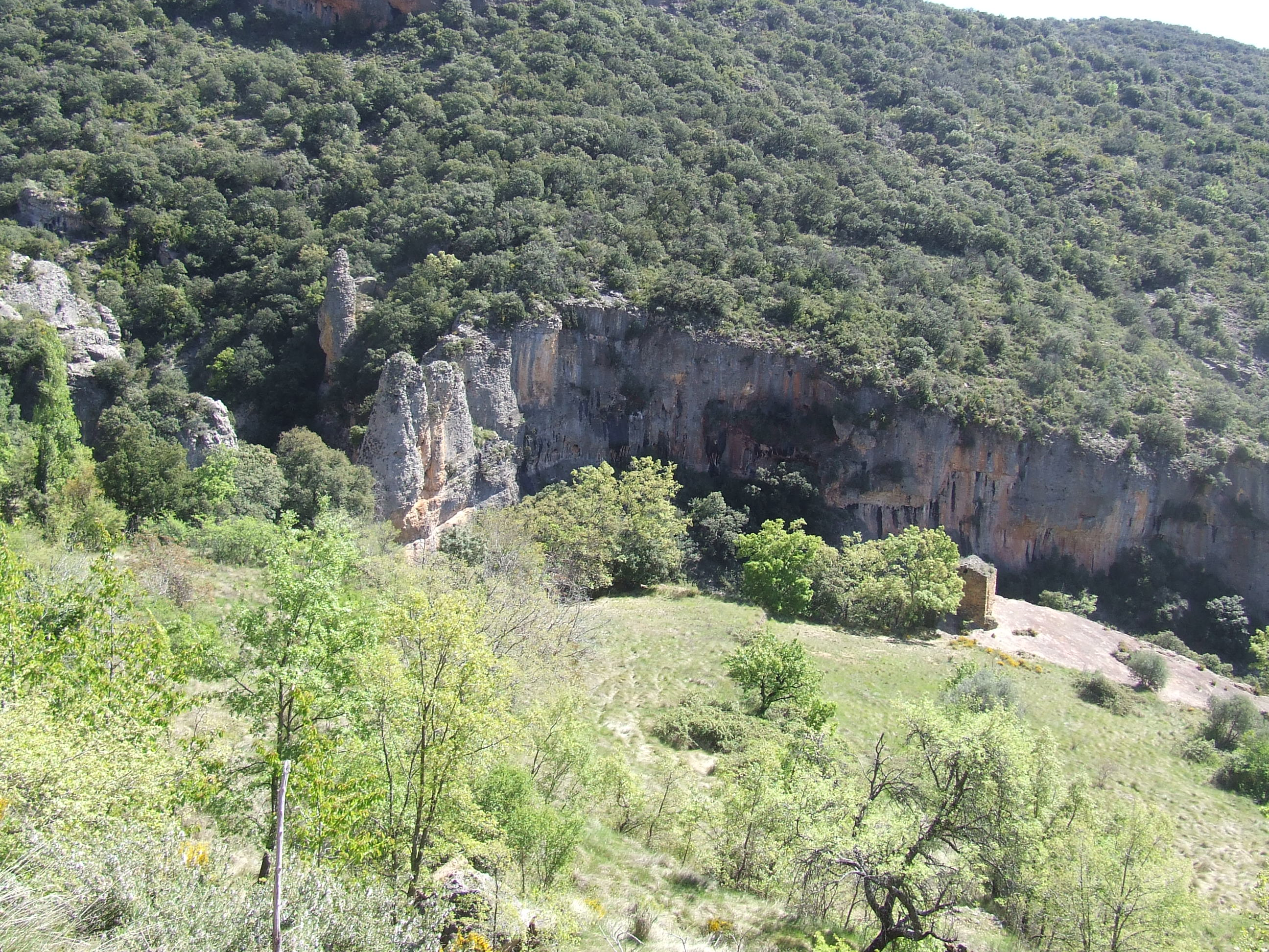 El Forat del Toscar, on es forma el barranc dels Lleons (Gurp de la Conca, Tremp, Pallars Jussà)